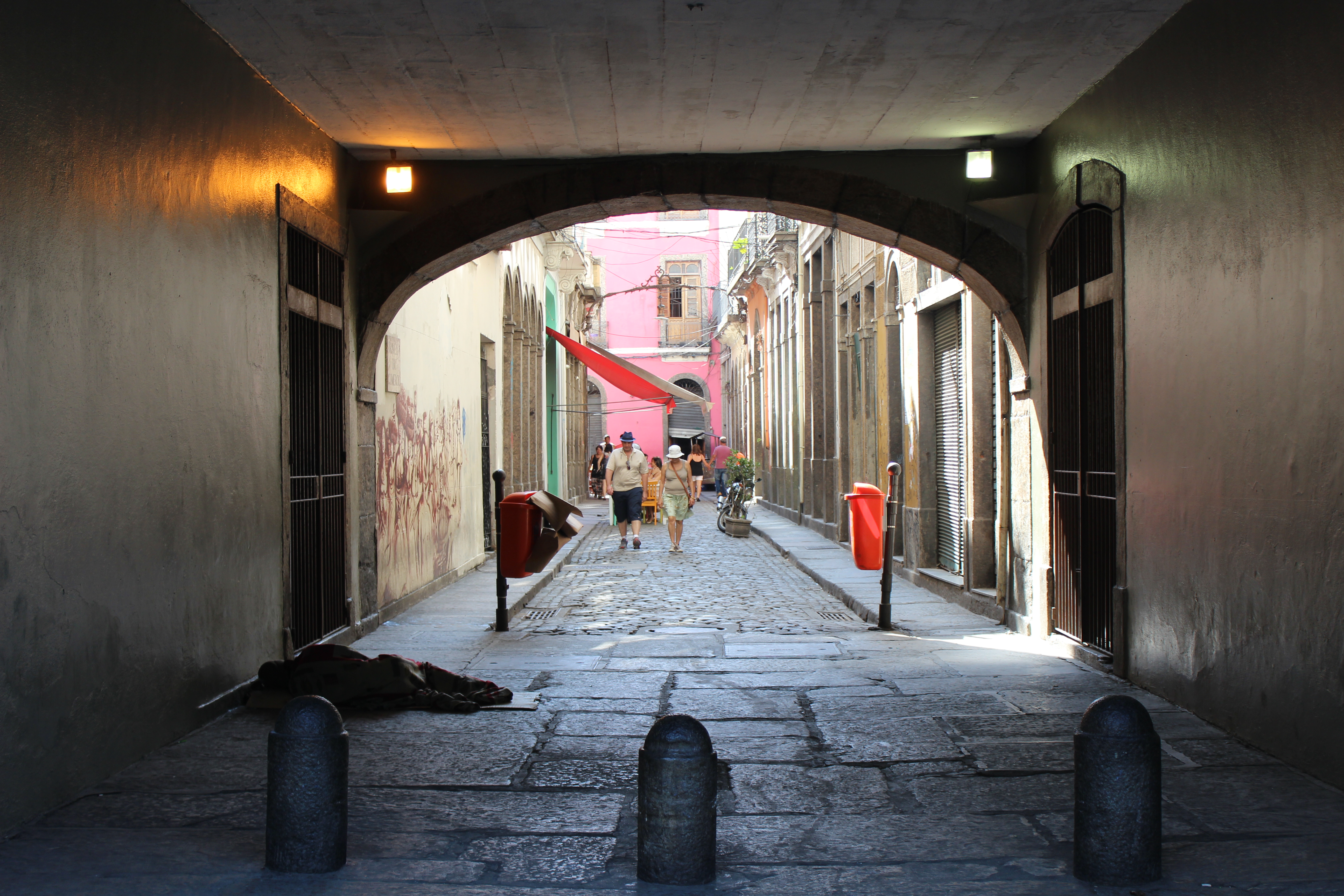 Área central da Praça Quinze de Novembro e imediações